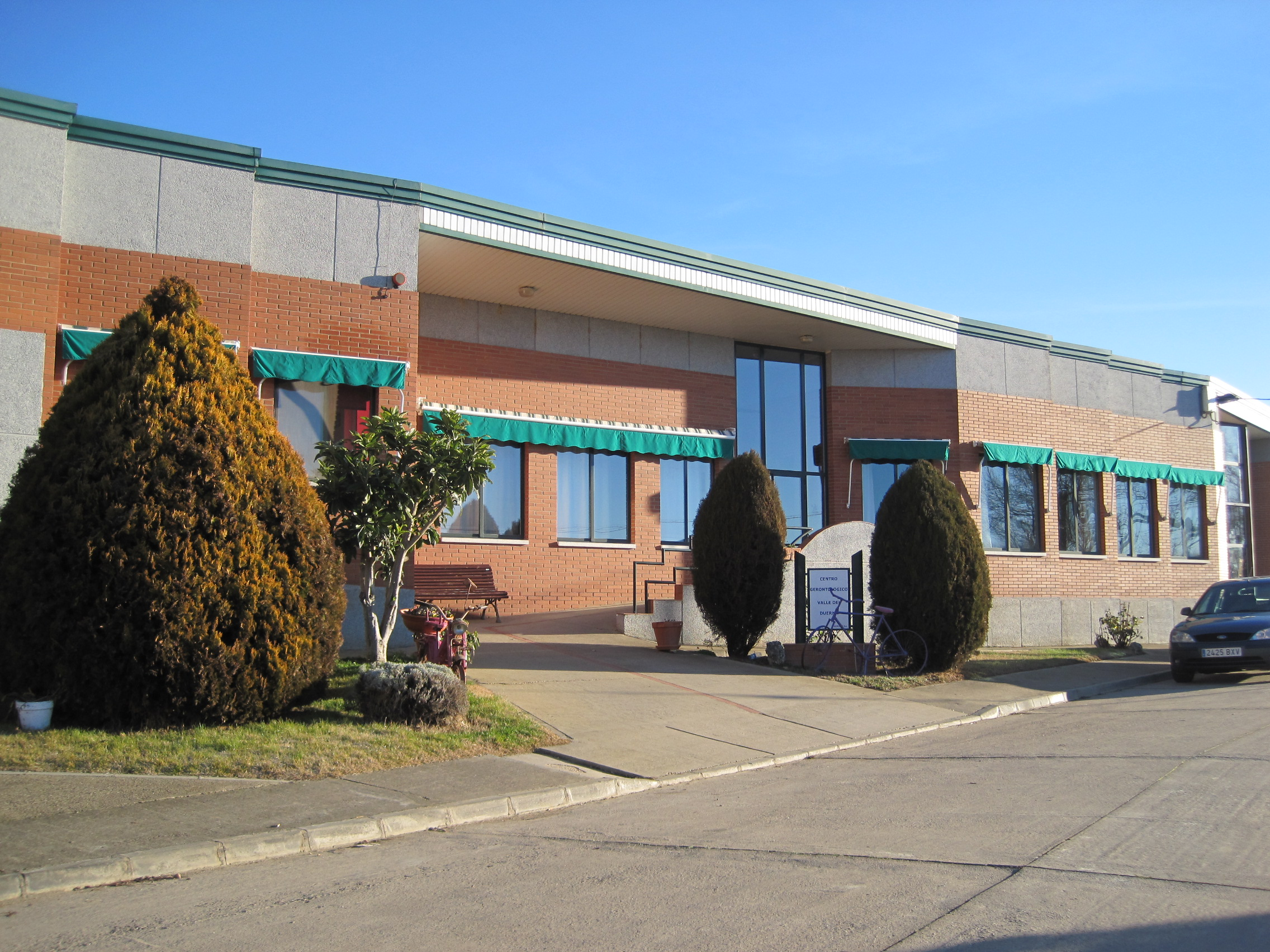 Residencia de ancianos en Palacios de la Valduerna (León, España).